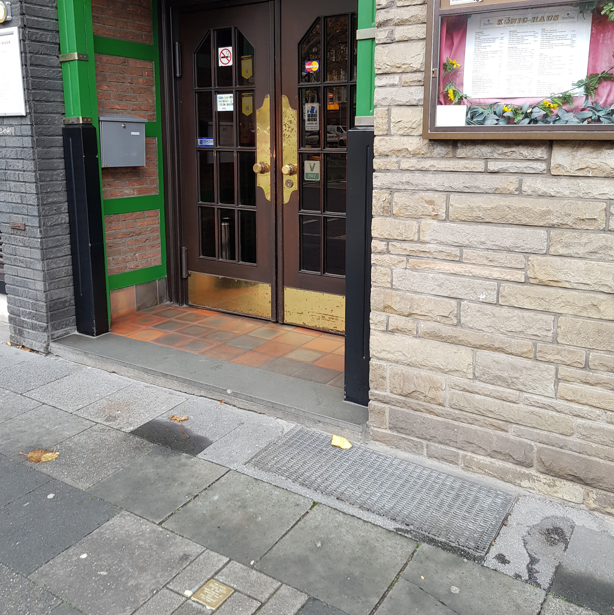 Ort des Stolpersteins für Samuel Kann